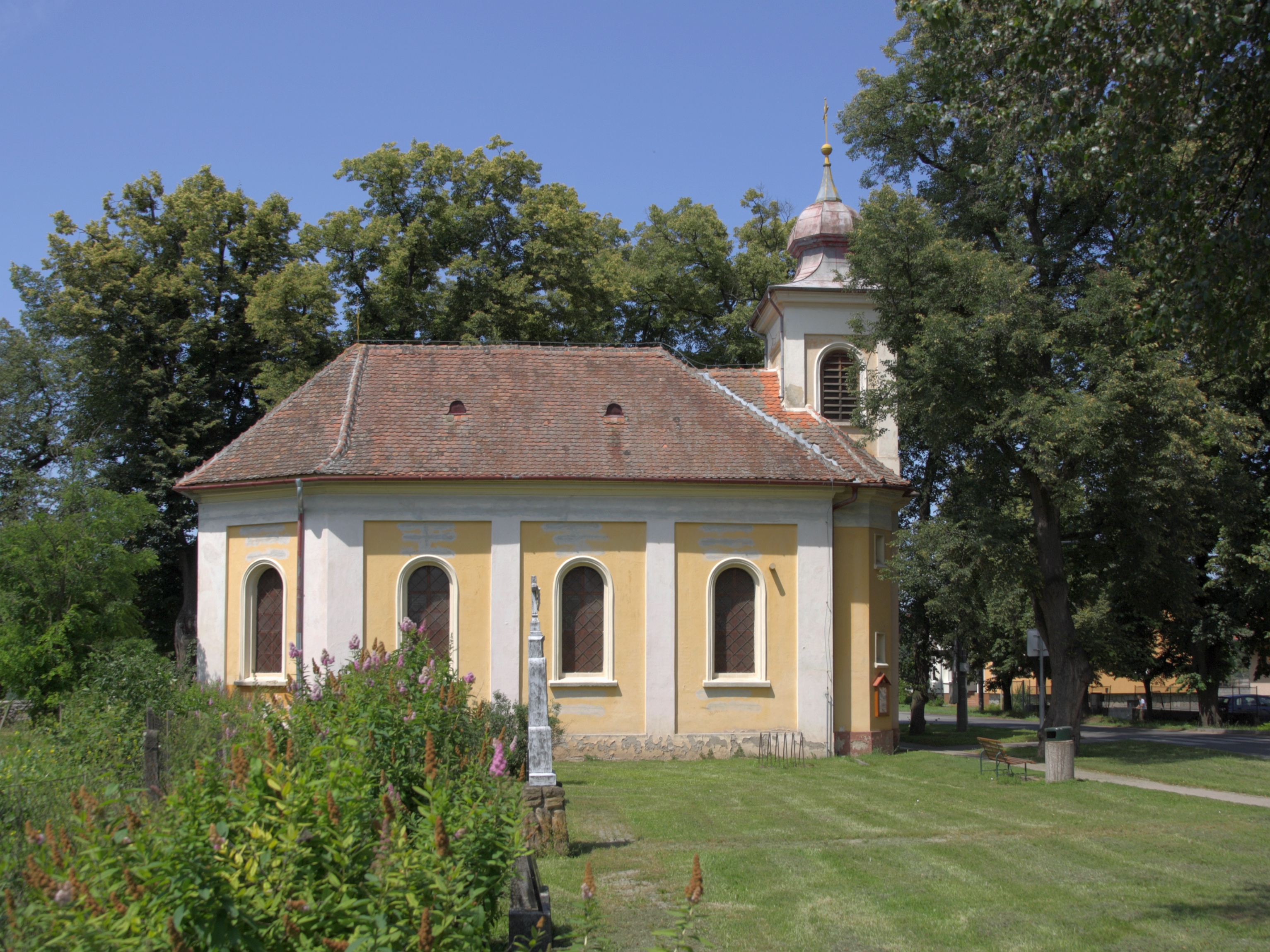 Rajhradice - kaple sv Scholastiky.